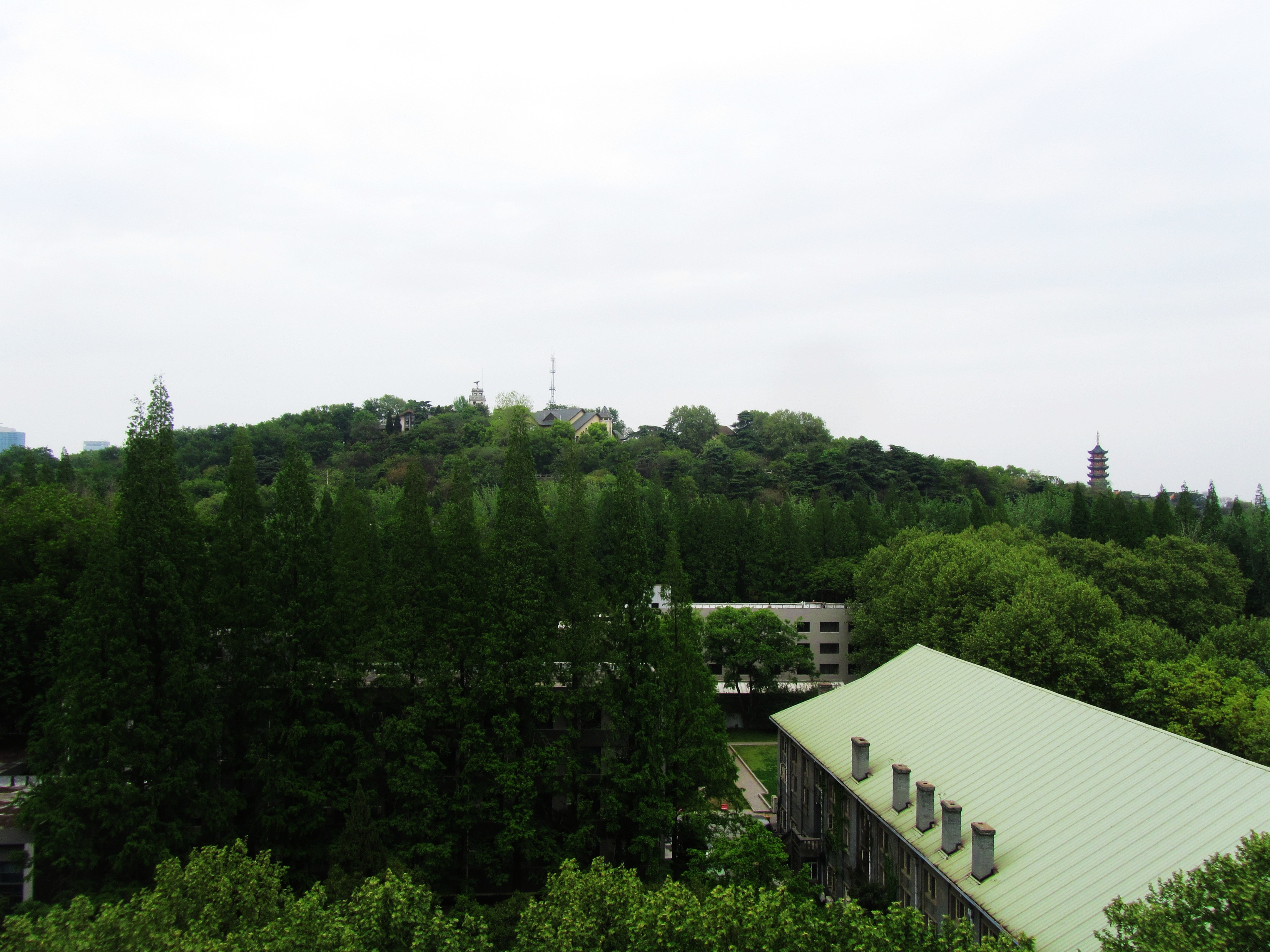 自东南大学榴园宾馆望北极阁全景。